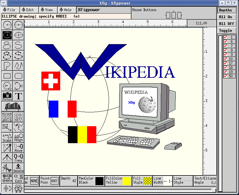 capture d'écran du logiciel Xfig avec à l'écran un dessin réalisé par Xfigpower